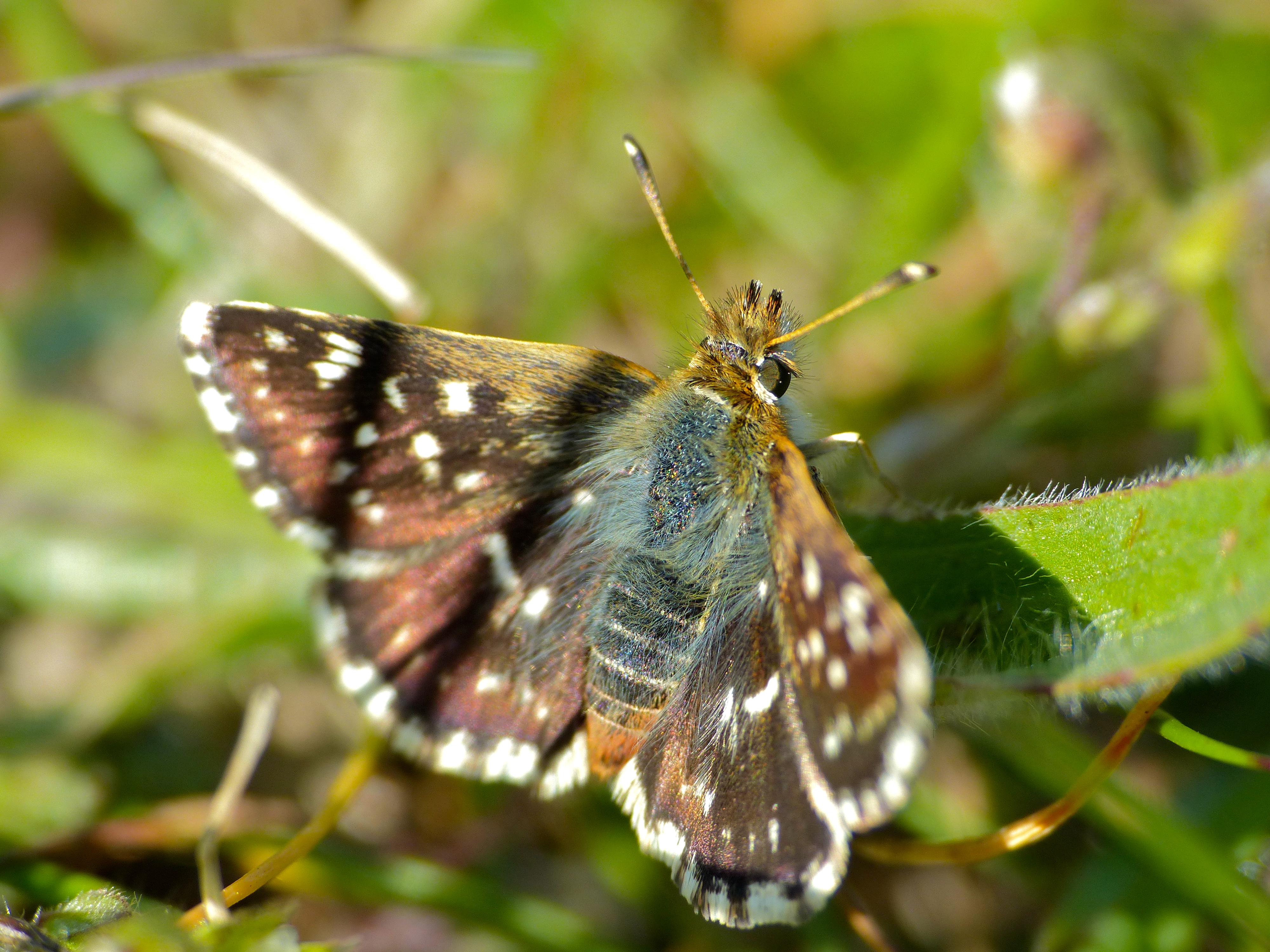 Les Rives, Hérault, FRANCE